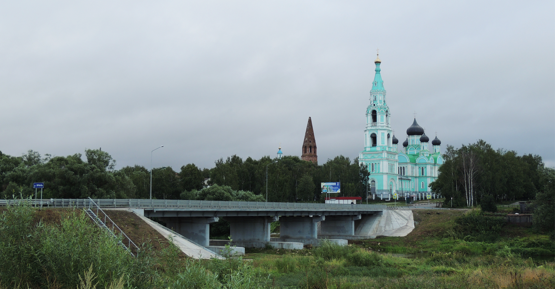 Ансамбль (собор Троицкий): улица Карла Маркса, 20, Яранск, Яранский район, Кировская область